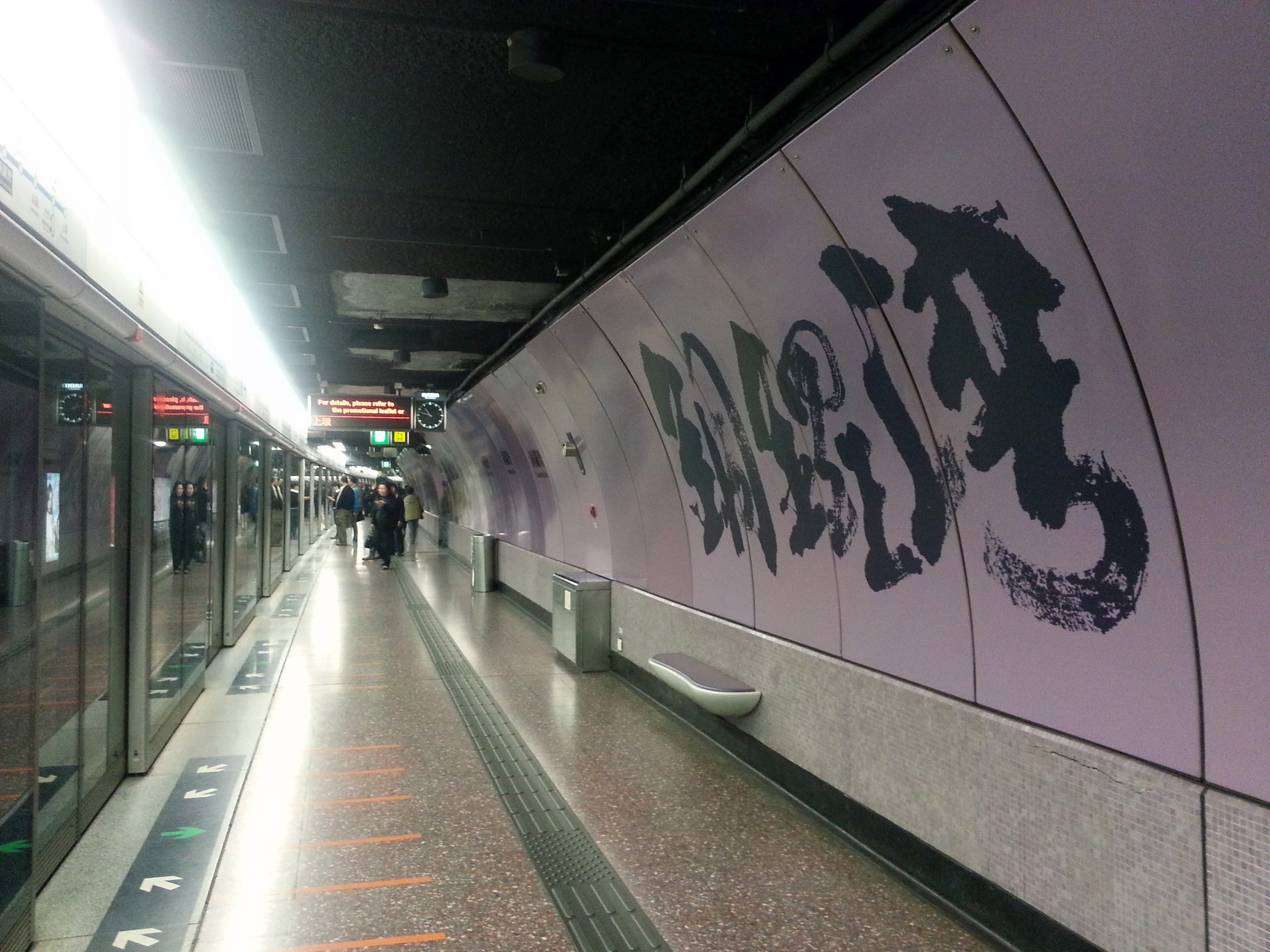 港鐵銅鑼灣站月台